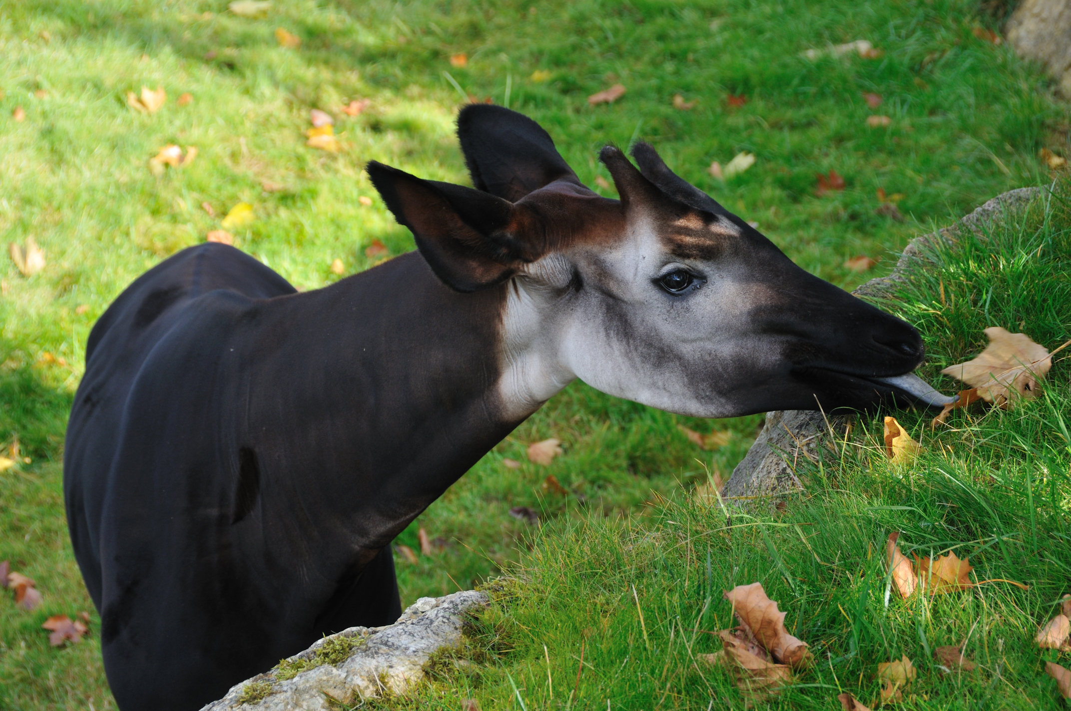 ZooParc de Beauval, Saint-Aignan, Loir-et-Cher, France Okapi (Okapia johnstoni)